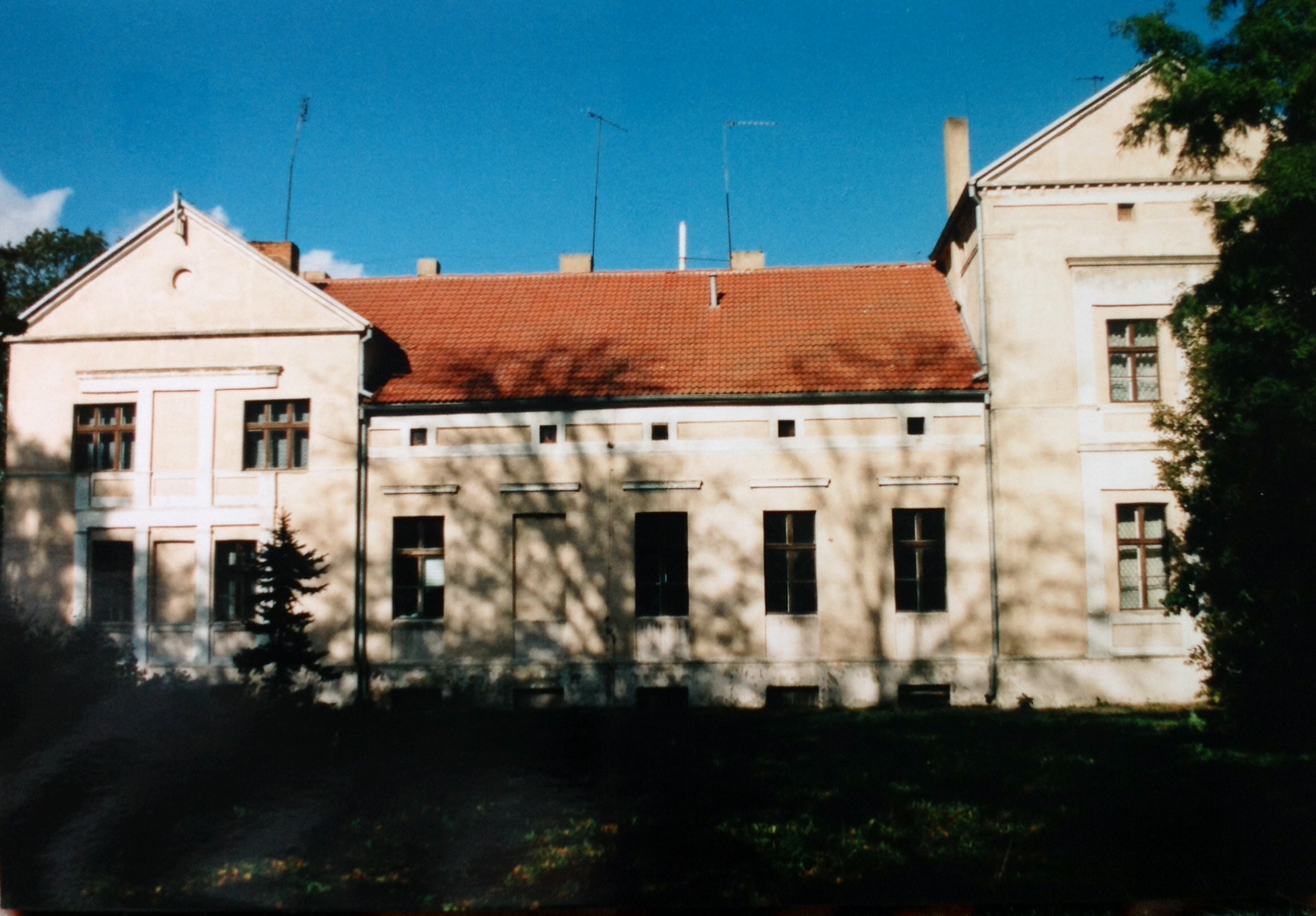 Tupadły - dwór